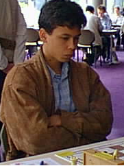 Rafael Leitao, Sparkassen - Open A der Dortmunder Schachtage 1998.